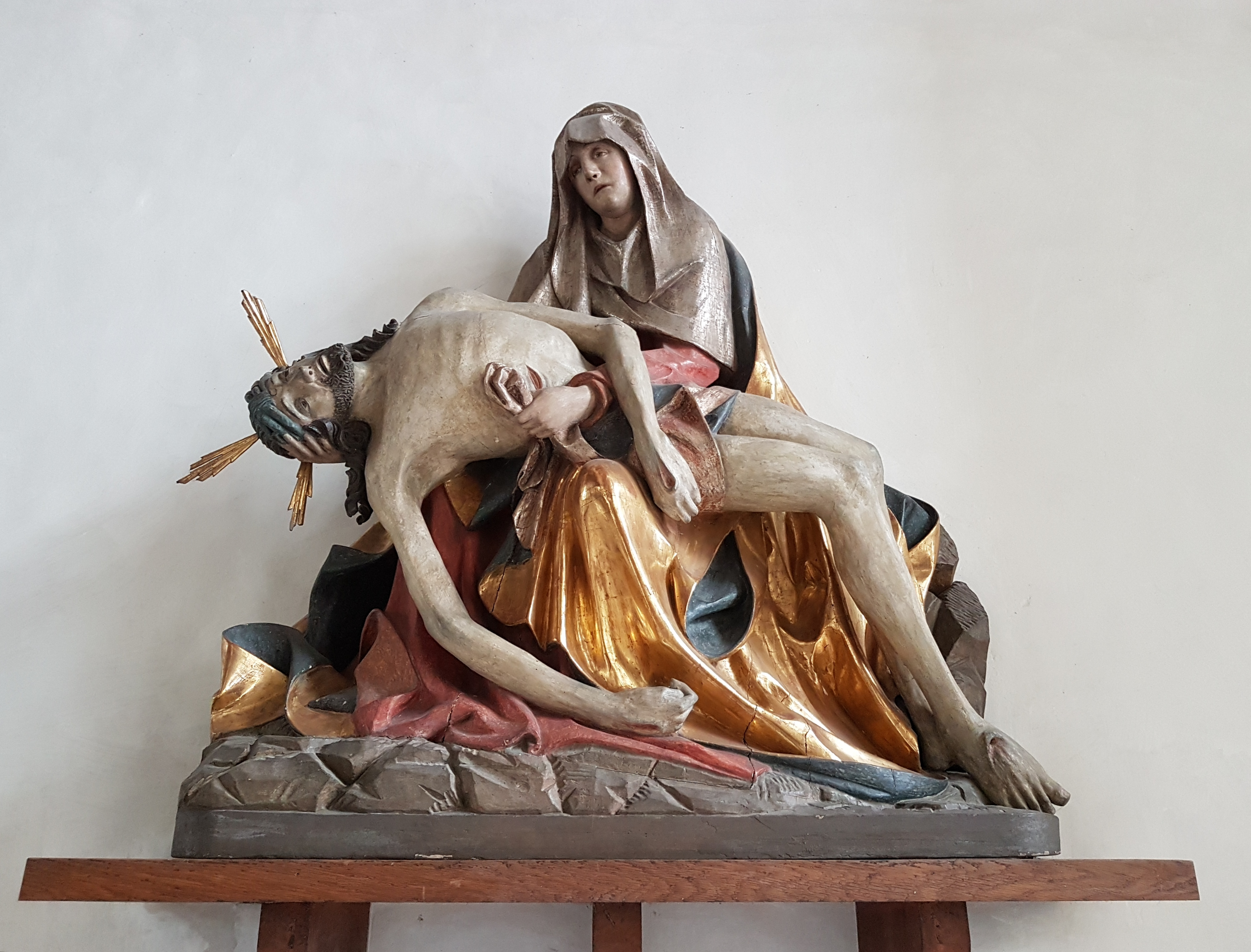 Liebfrauenmünster Donauwörth, Pieta des rechten Seitenaltars